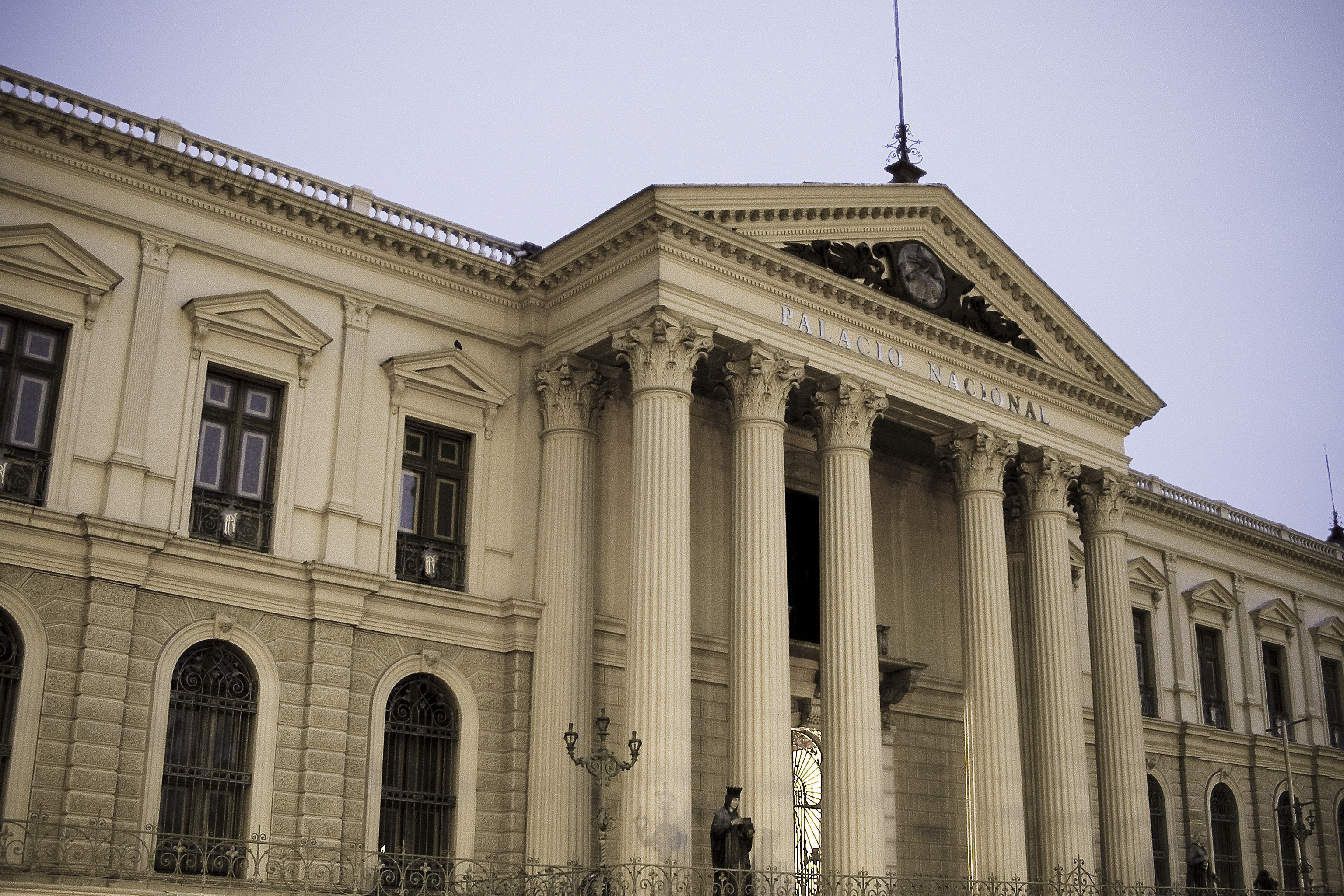 Palacio Nacional de El Salvador al atardecer.